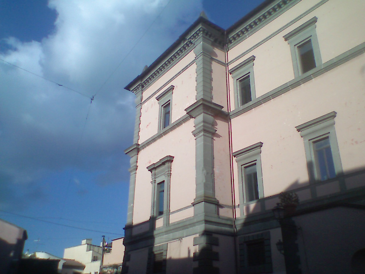 Torre quadrangolare di Palazzo Colonna a Marino.